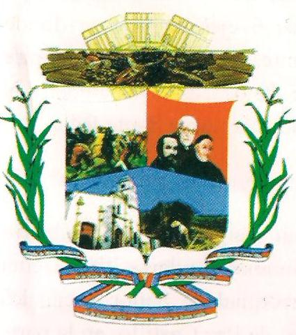 El escudo del Municipio Autónomo Paz Castillo, Estado Miranda, Venezuela.